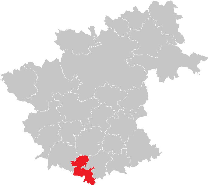 Bezirk Zwettl